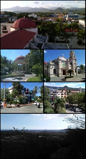 arriba:zona norta de Baní, abajo superior:Parque Central y Catedral Nuestra Señora de Regla, abajo inferior:Ayuntamiento Municipal y Centro de Baní, debajo: Baní visto desde el Cucurucho de Peravia.